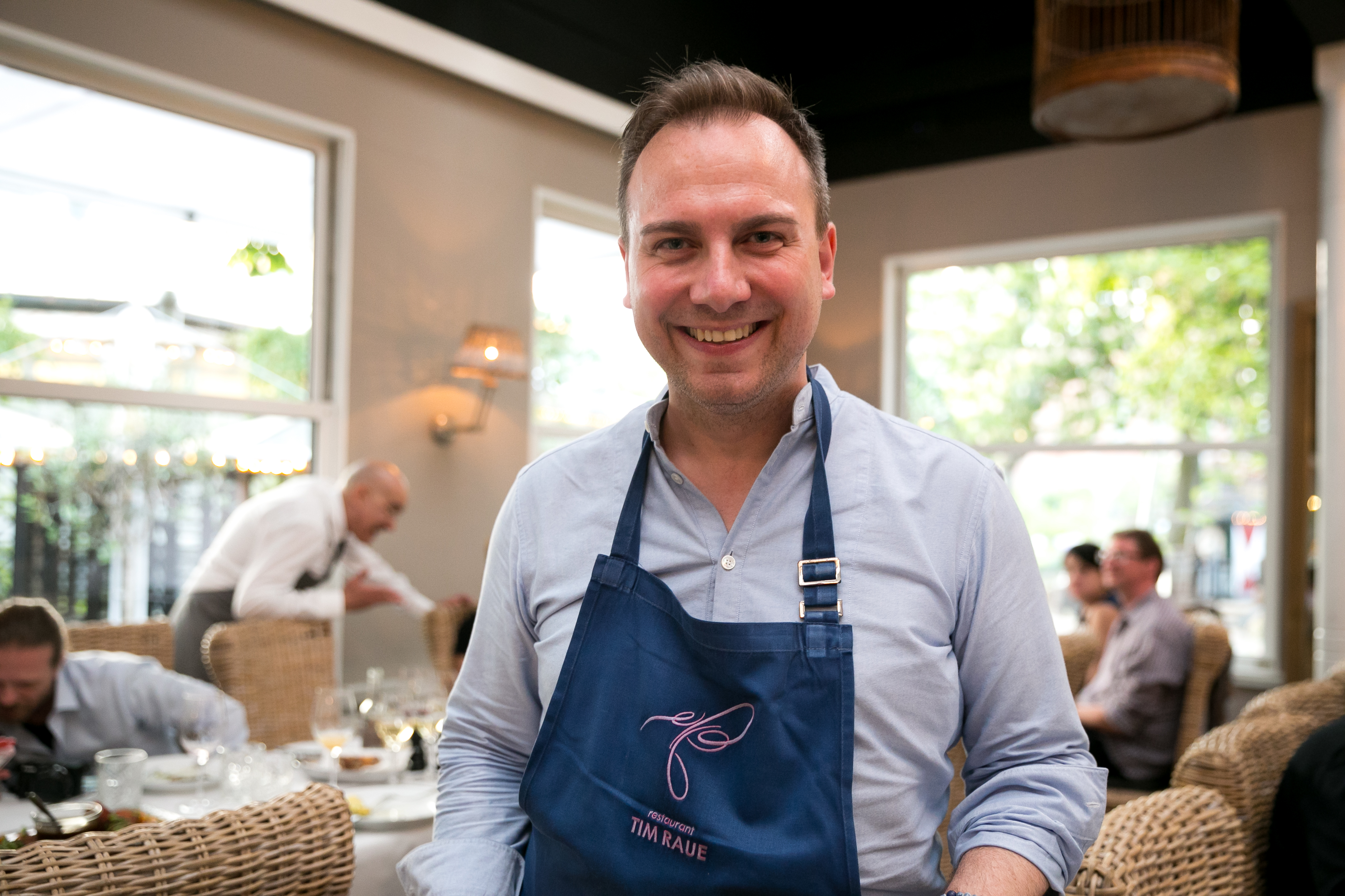 Denmark - Copenhagen - OAD 2016 Top 100+ Restaurants Event (May 2016)